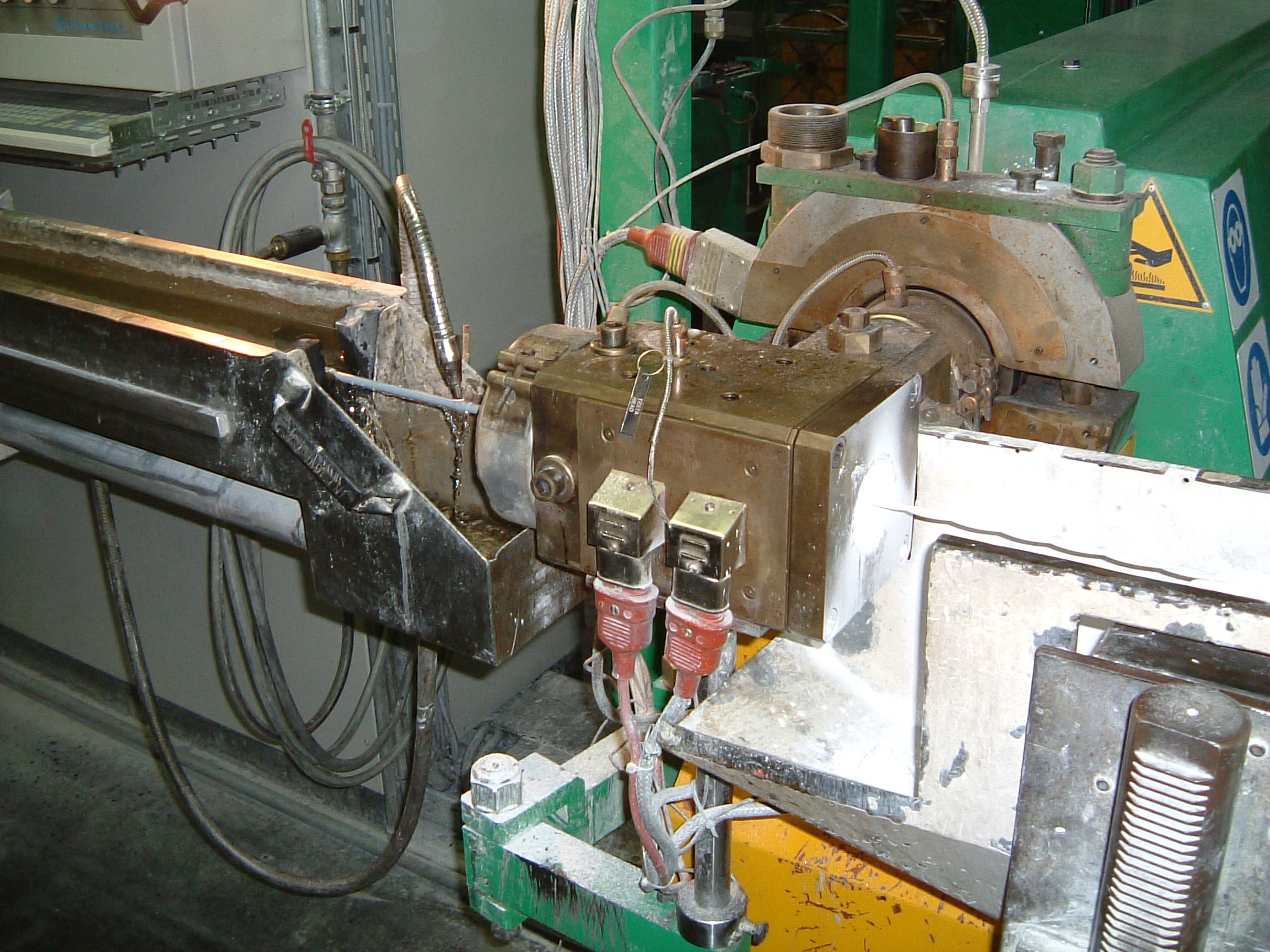 Kabelfertigung: Aufbringen des Kabelmantels mittels Extruder